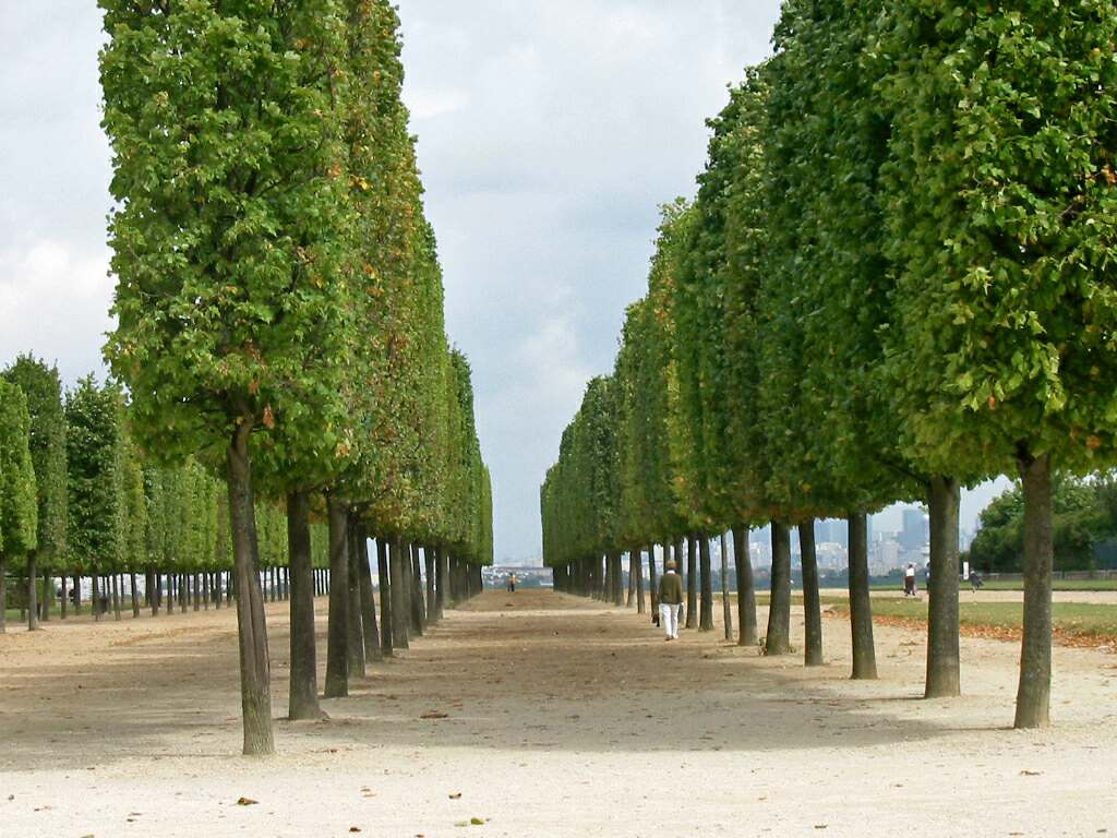 Allées de tilleuls, terrasse du château de Saint-Germain-en-Laye (Yvelines)